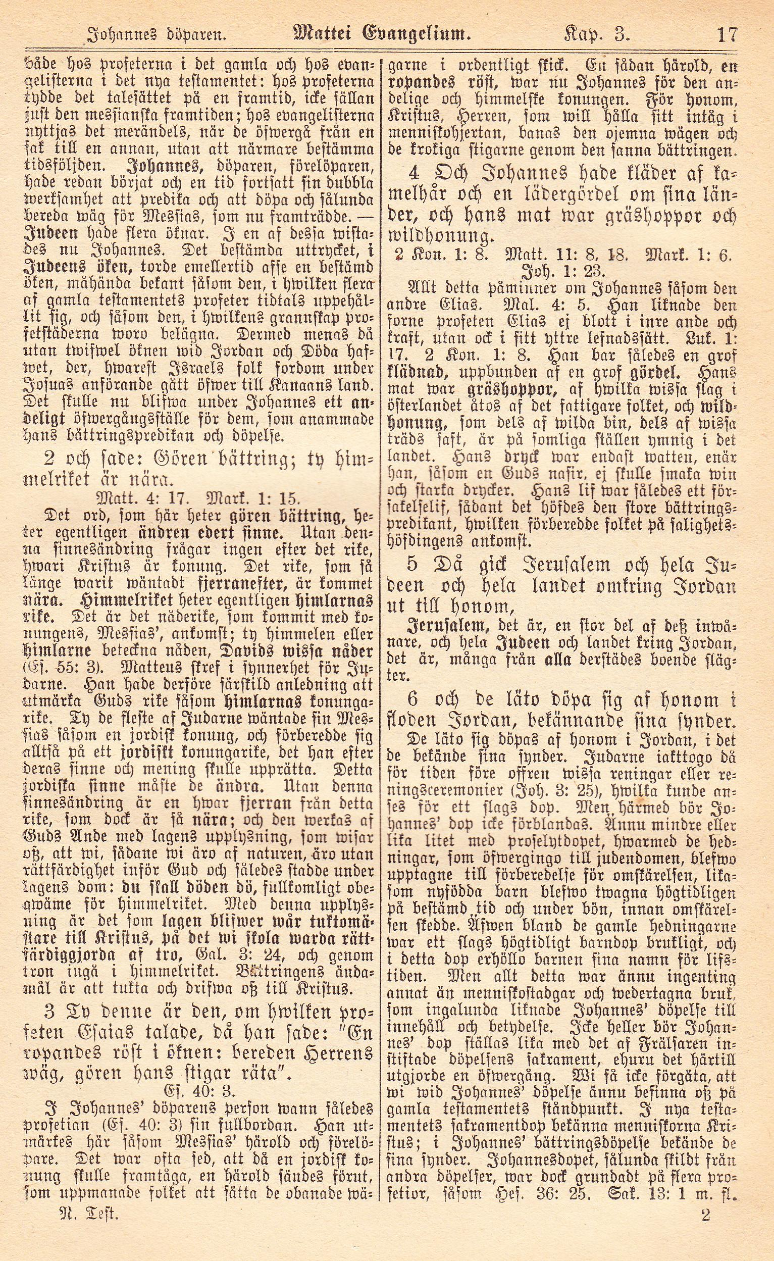 Scannad bild av Peter Fjellstedts bibel med kommentarer uppl 1890 del III